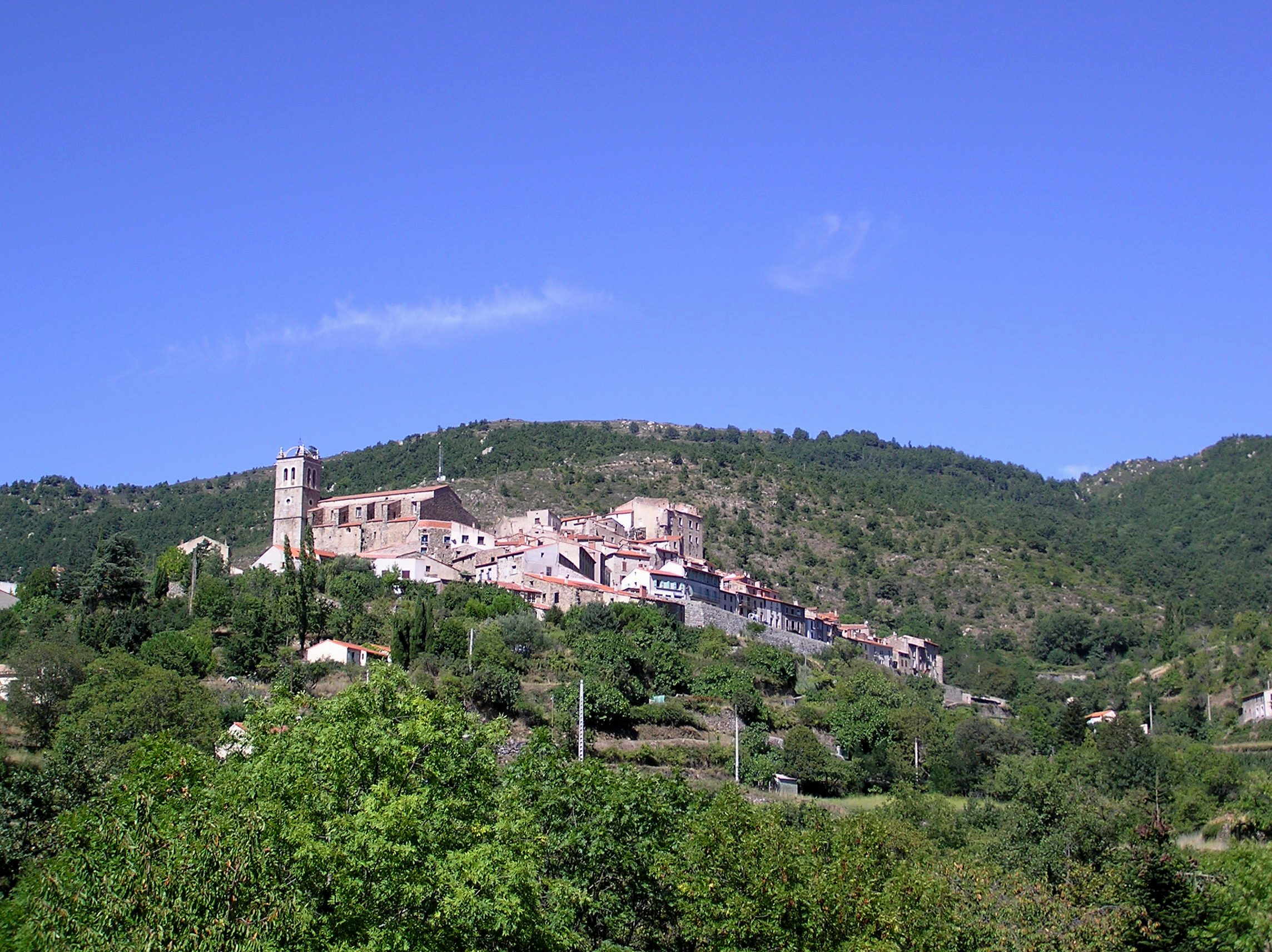 Photo du village de mosset depuis la route de la Carole à Campome